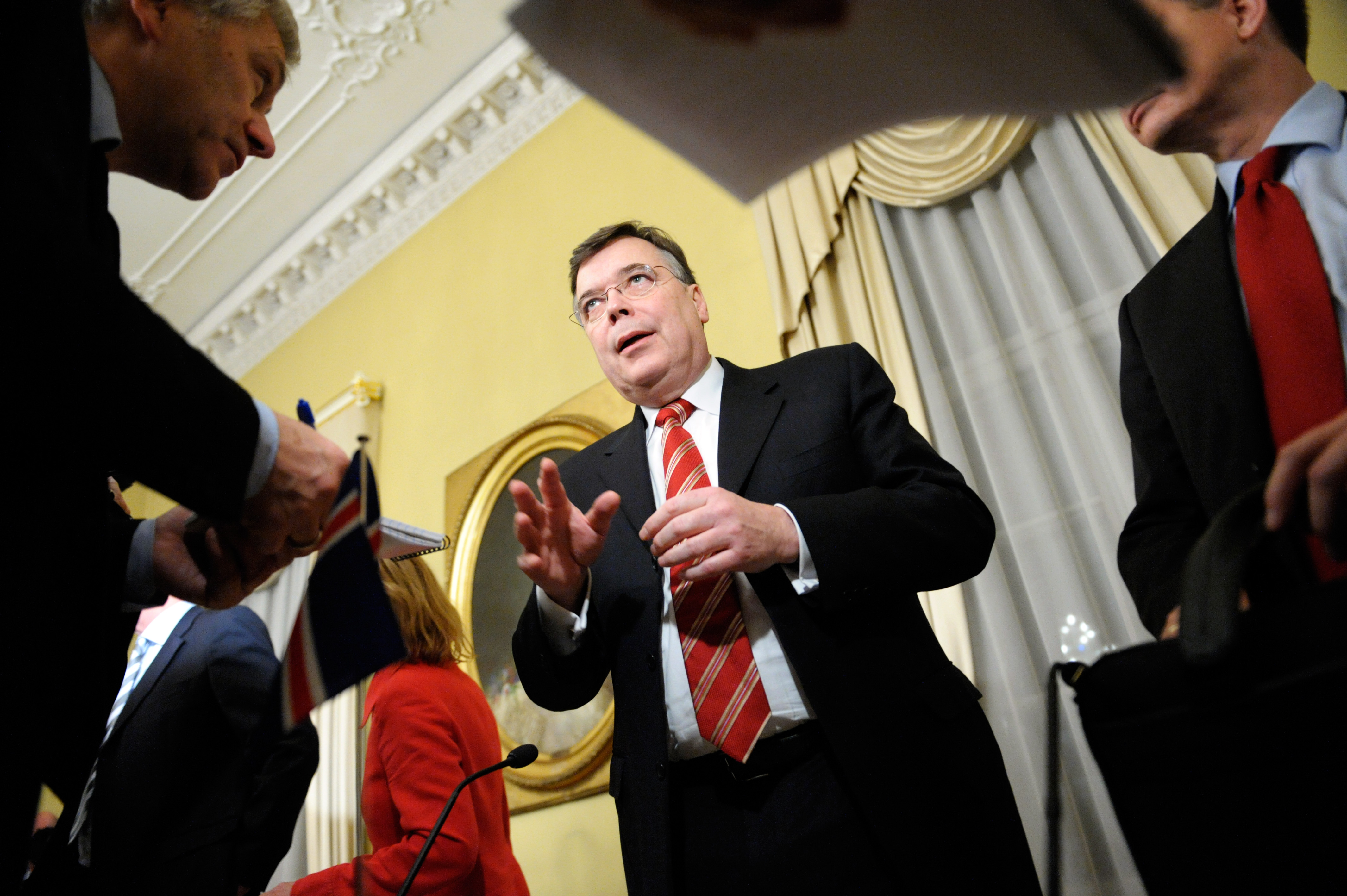 Geir H. Haarde statsminister Island på pressmöte under Nordiska rådets session i Helsingfors 2008-10-27